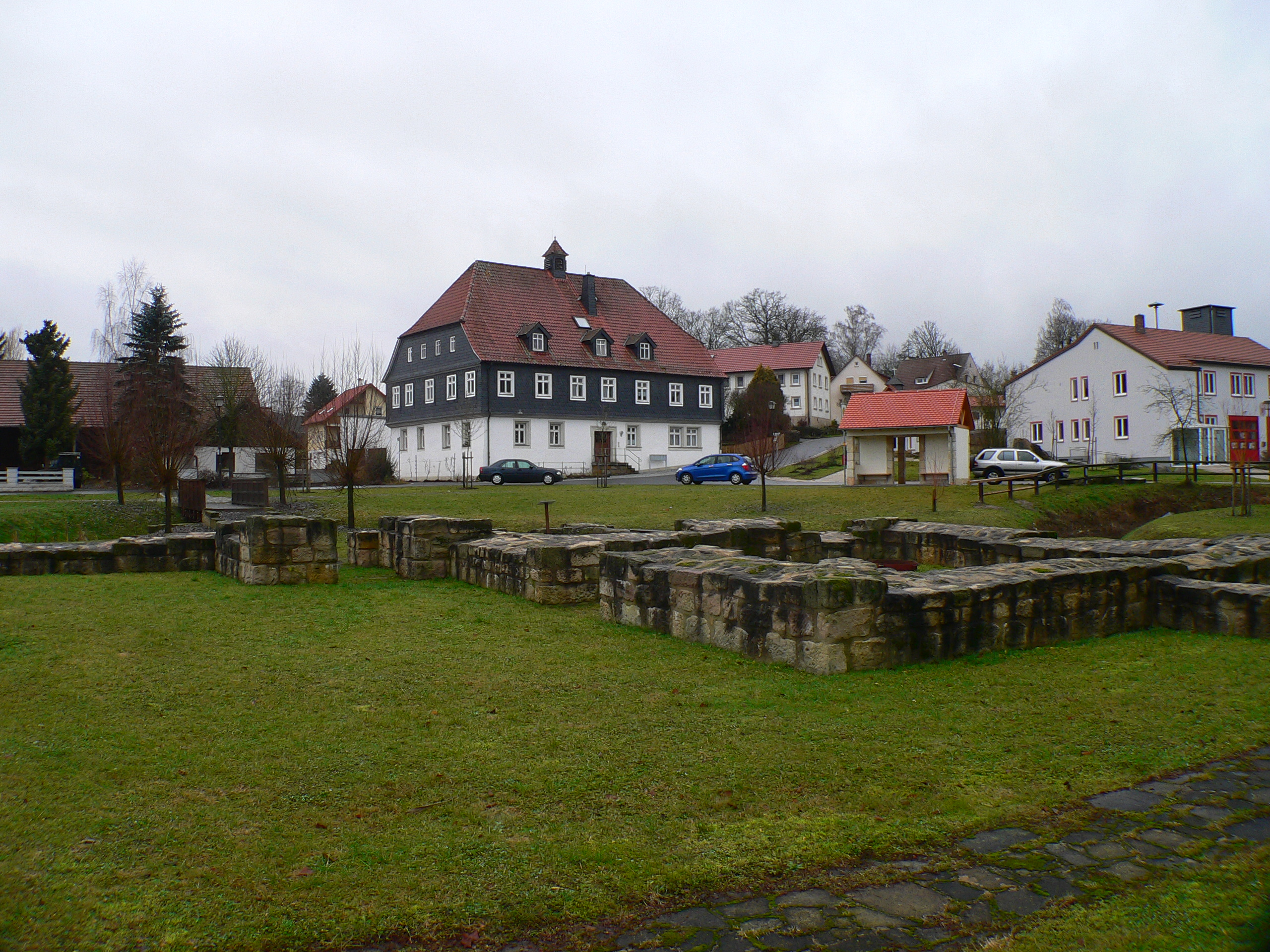 Wasserburg Tüschnitz in Küps, Bayern, Regierungsbezirk Oberfranken, Landkreis Kronach – Gesicherte Fundamente, im Hintergrund Ökonomiehaus aus 1822